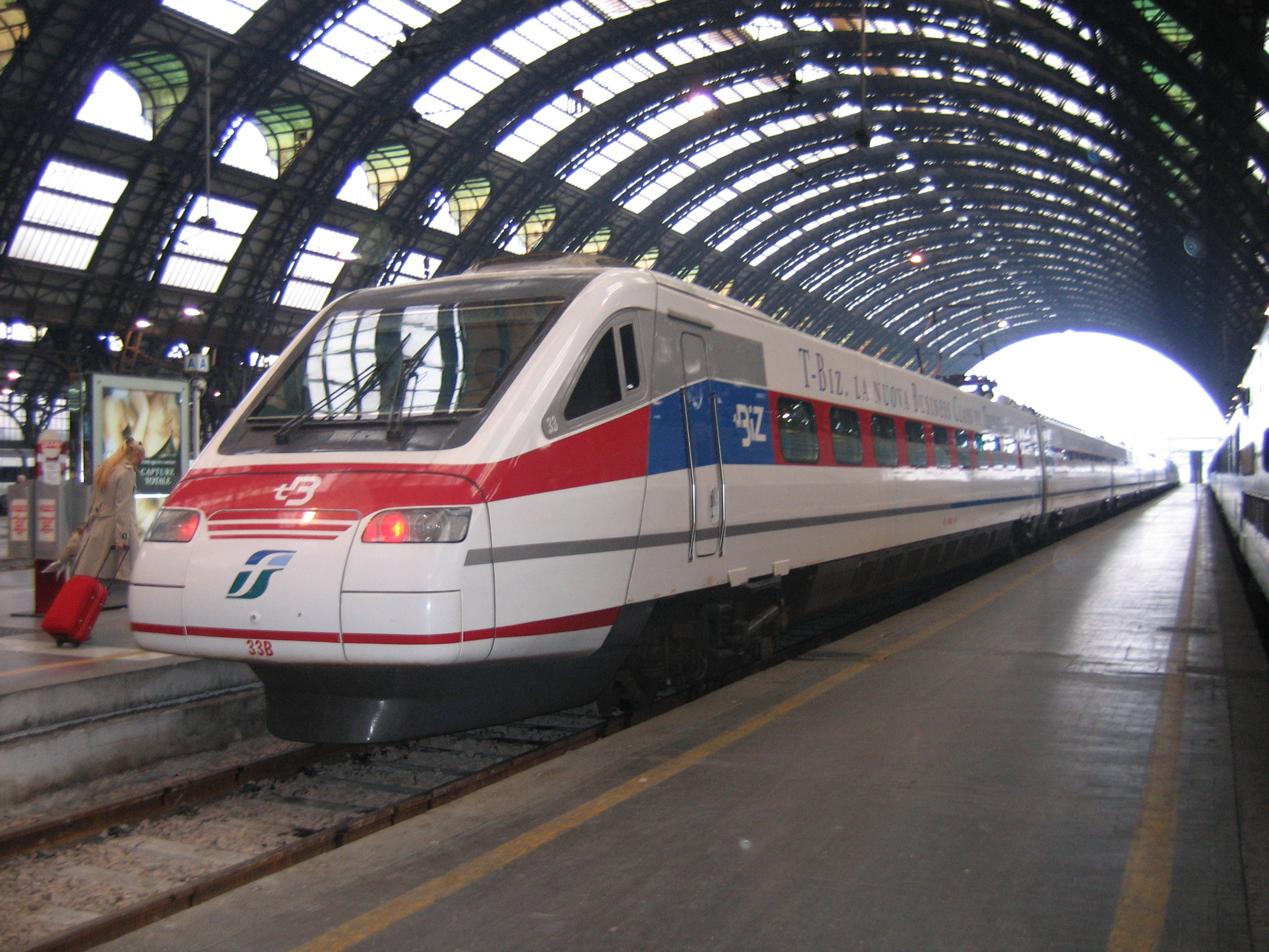 ETR480-33 T-BIZ of Ferrovie dello Stato. Stazione Centrale di Milano, Italy